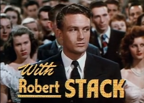 Imagem do trailer do filme A Date with Judy (1948). Os trailers dos filmes publicados antes de 1964 nos Estados Unidos são de domínio público.